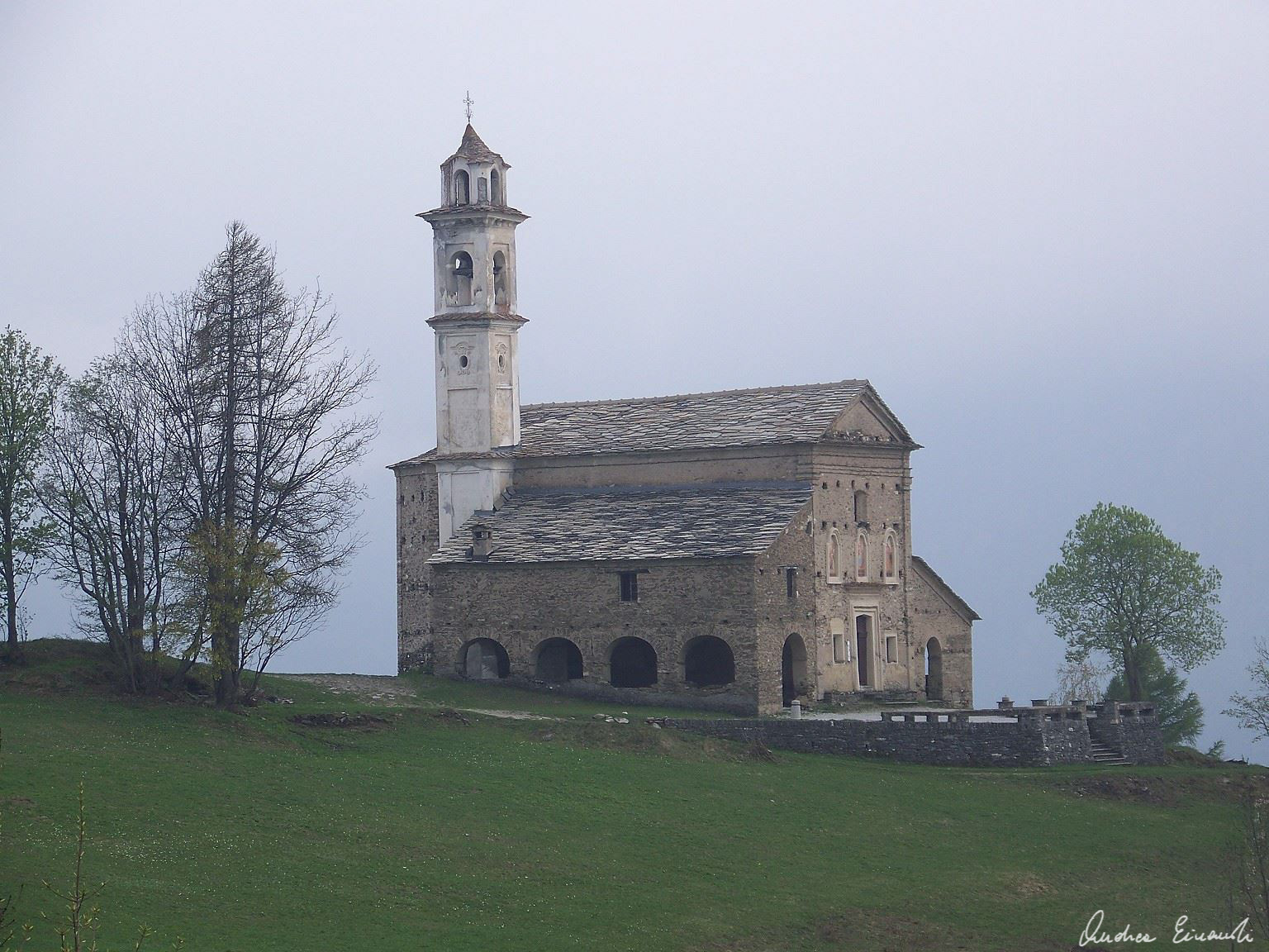 Vista dalla strada che dall'abitato di Morinesio conduce al santuario